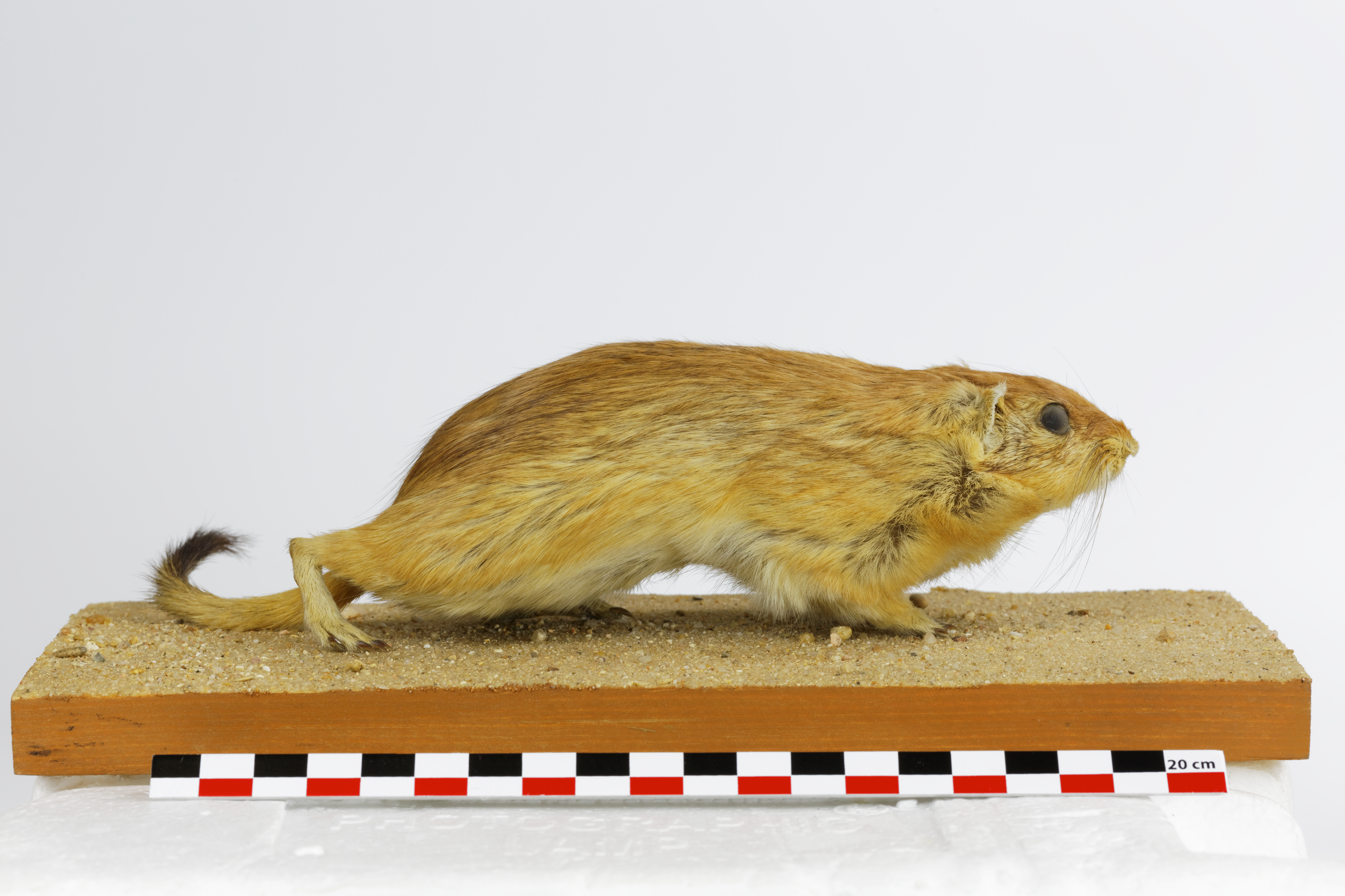 Nom vernaculaire Rat des sables Nom latin Psammomys obesus. Nature du spécimen animal à la peau naturalisée Place dans le règne animal Chordé, Mammifère, Rongeur. Provenance Collection de Zoologie de l'Université Pierre et Marie Curie (UPMC) à Paris Dimensions du socle (cm) 24,7 (L) x 11,3 (l) x 1,6 (h) (bois) Longueur approximative du spécimen (cm) 11,5* (sans la queue). Hauteur total du spécimen (cm) 7,4*